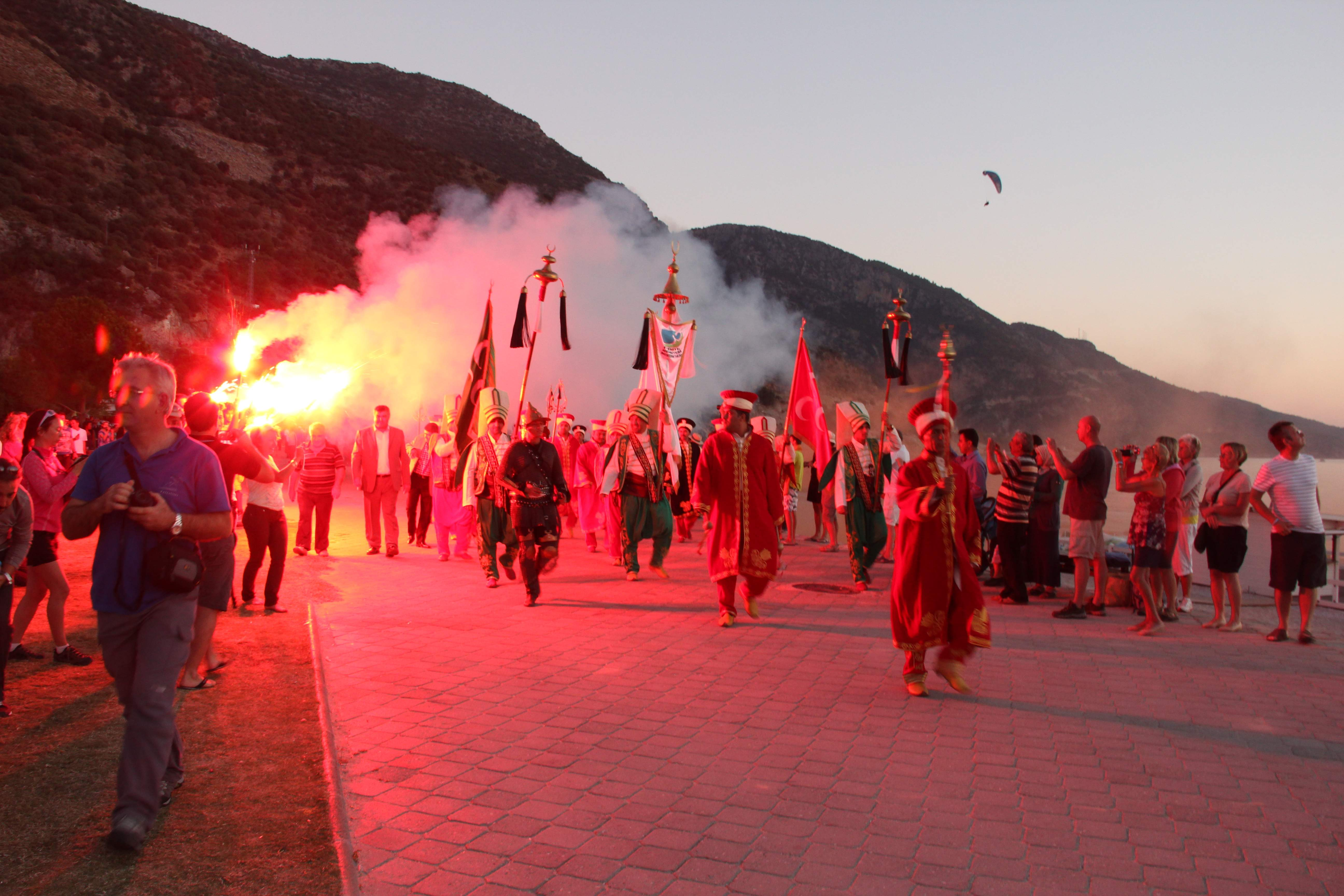 شروع فستیوال ورزشهای هوایی